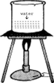 പകർപ്പവകാശ വിവരങ്ങൾ